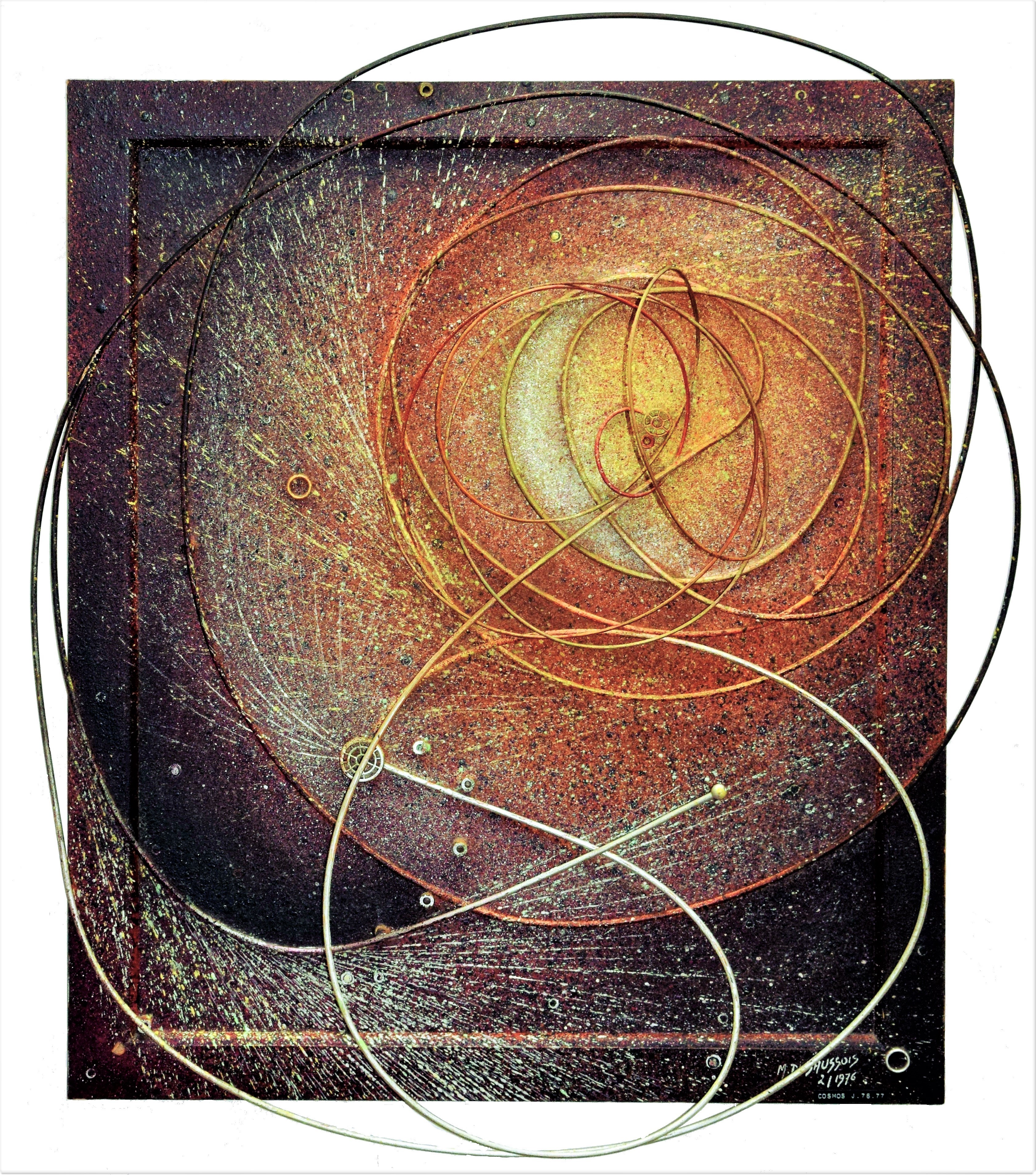 Il s'agit d'un tableau où la troisième dimension est apportée par des joncs sur une vingtaine de cm de profondeur.